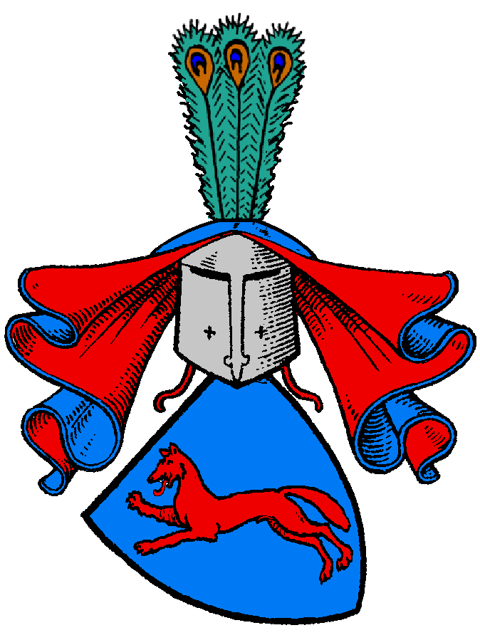 Stammwappen der ritterbürtigen von Brockhusen, in einigen Zweigen des Geschlechts auch Brockhausen oder Bruchhausen genannt, eines Anfang des 13. Jahrhunderts über Mecklenburg nach Pommern eingewanderten ritterbürtigen Geschlechts mit Zweigen in Westfalen.